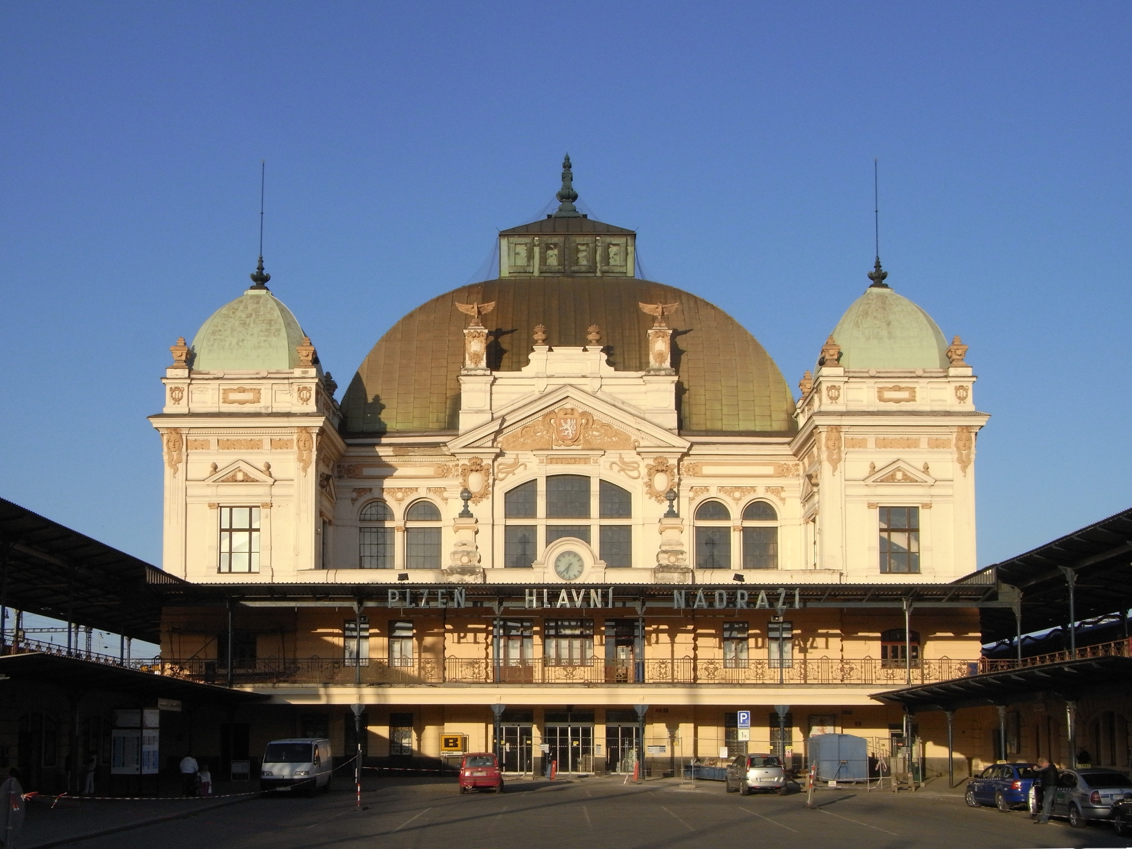 Der Hauptbahnhof in Pilsen (CZ).